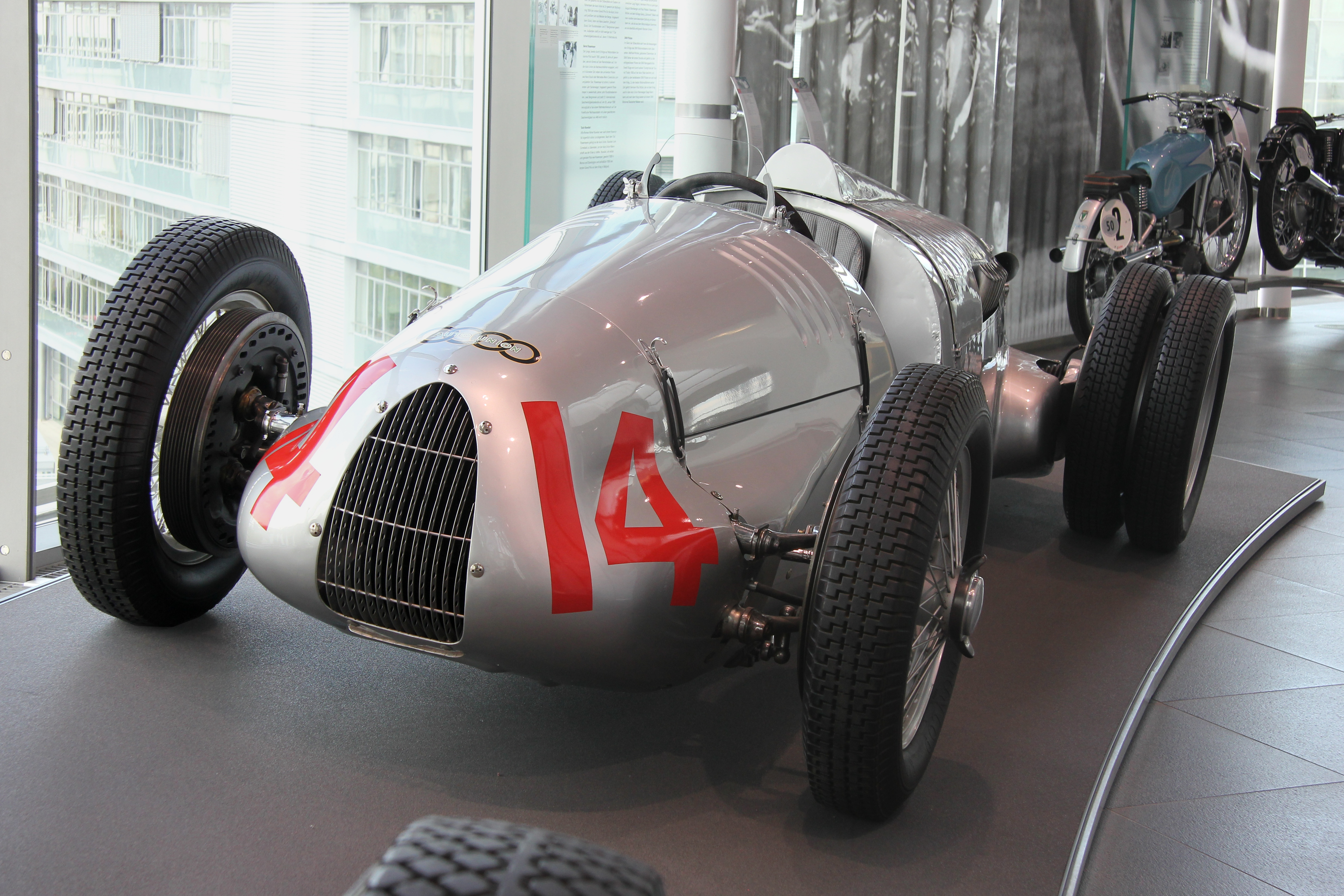 Auto-Union-Bergrennwagen mit dem Fahrgestell des Typs D von 1939 und dem 16-Zylinder-Motor des Typs C mit 6 Liter Hubraum und Kompressor im museum mobile. Der Wagen ist der einzige der fünf noch existierenden Auto-Union-Rennwagen, der Krieg und Nachkriegszeit im Originalzustand überstand. Er wurde in den 1970er-Jahren in Riga entdeckt und von Audi zurückgekauft.